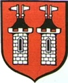 Herb Czersky Mazowieckego.